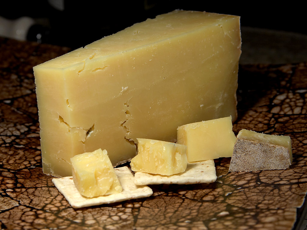 Keen's Cheddar cheese